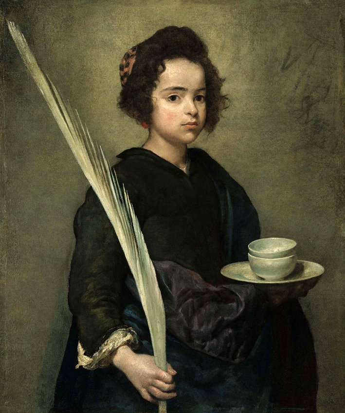 La obra representa a la virgen y mártir Santa Rufina, que fue hermana de Santa Justa y murió con ella según la tradición por profesar el cristianismo